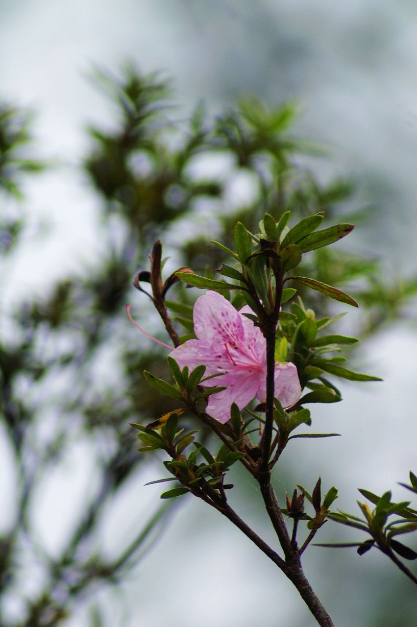 Rhododendron Anehirai Wilson 烏來杜鵑